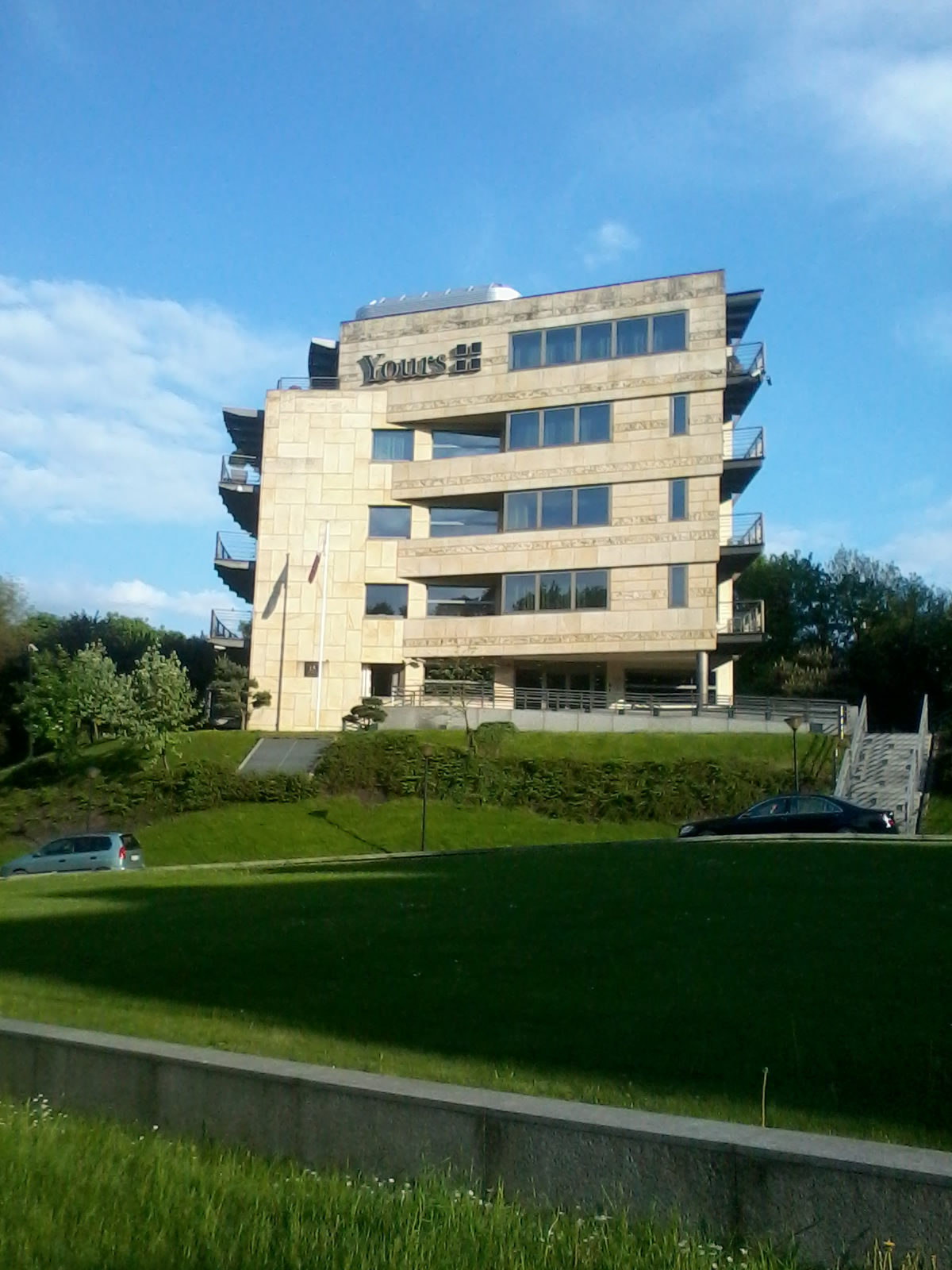 Ambasada Kataru w Warszawie